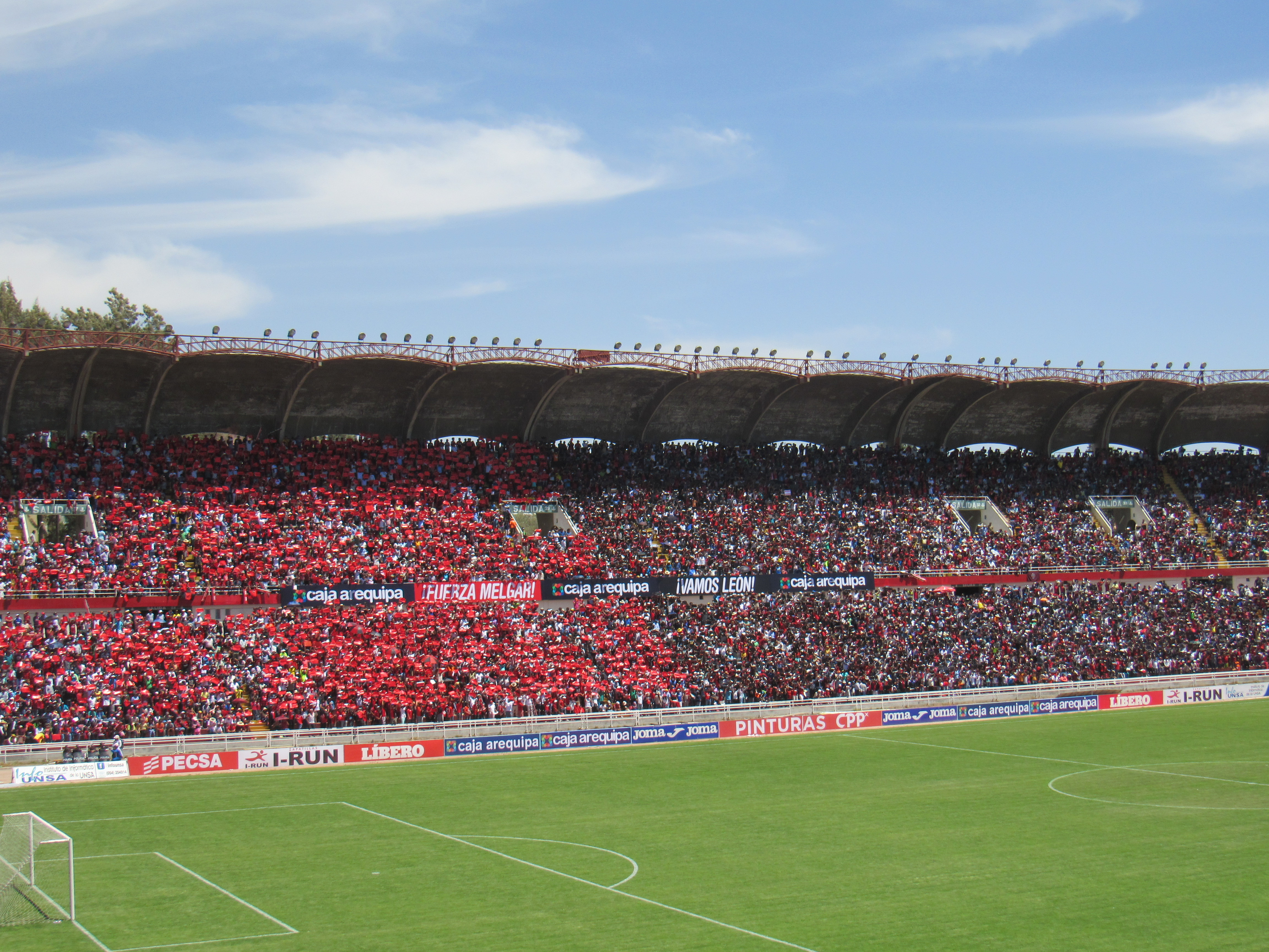 Tribuna Oriente del Estadio Monumental UNSA. Partido por la semifinal entre FBC Melgar vs Real Garcilaso